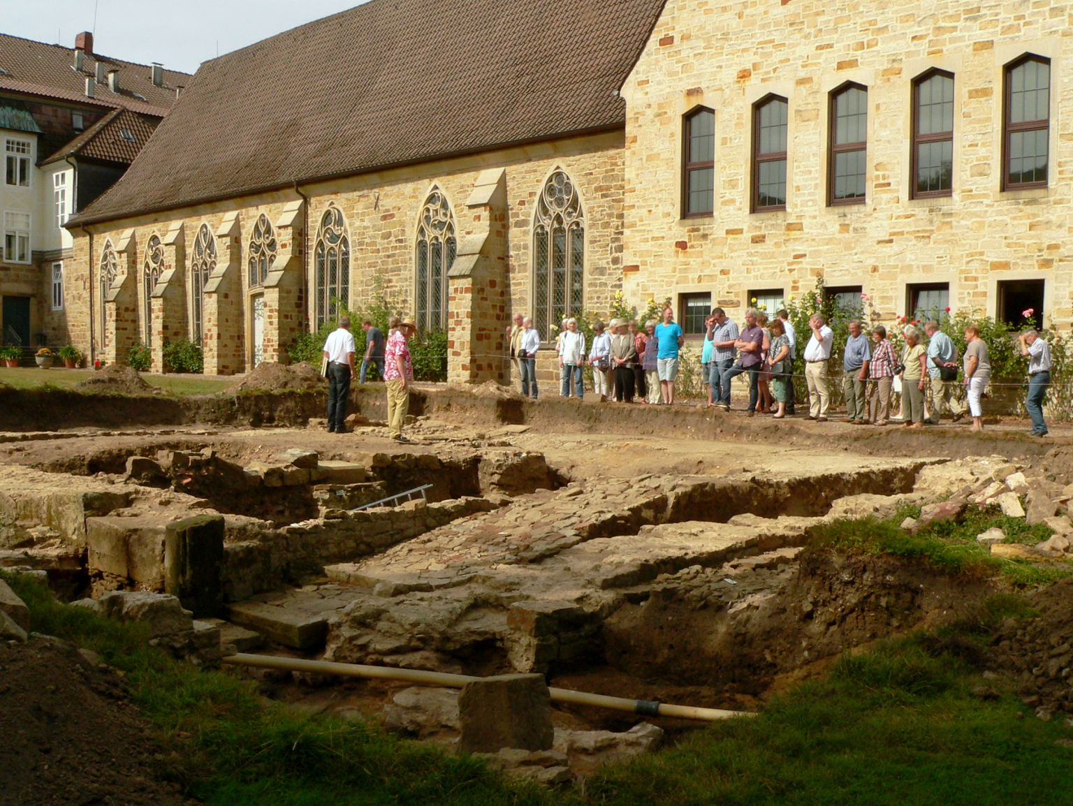 Ausgrabungsfläche beim Kloster Loccum